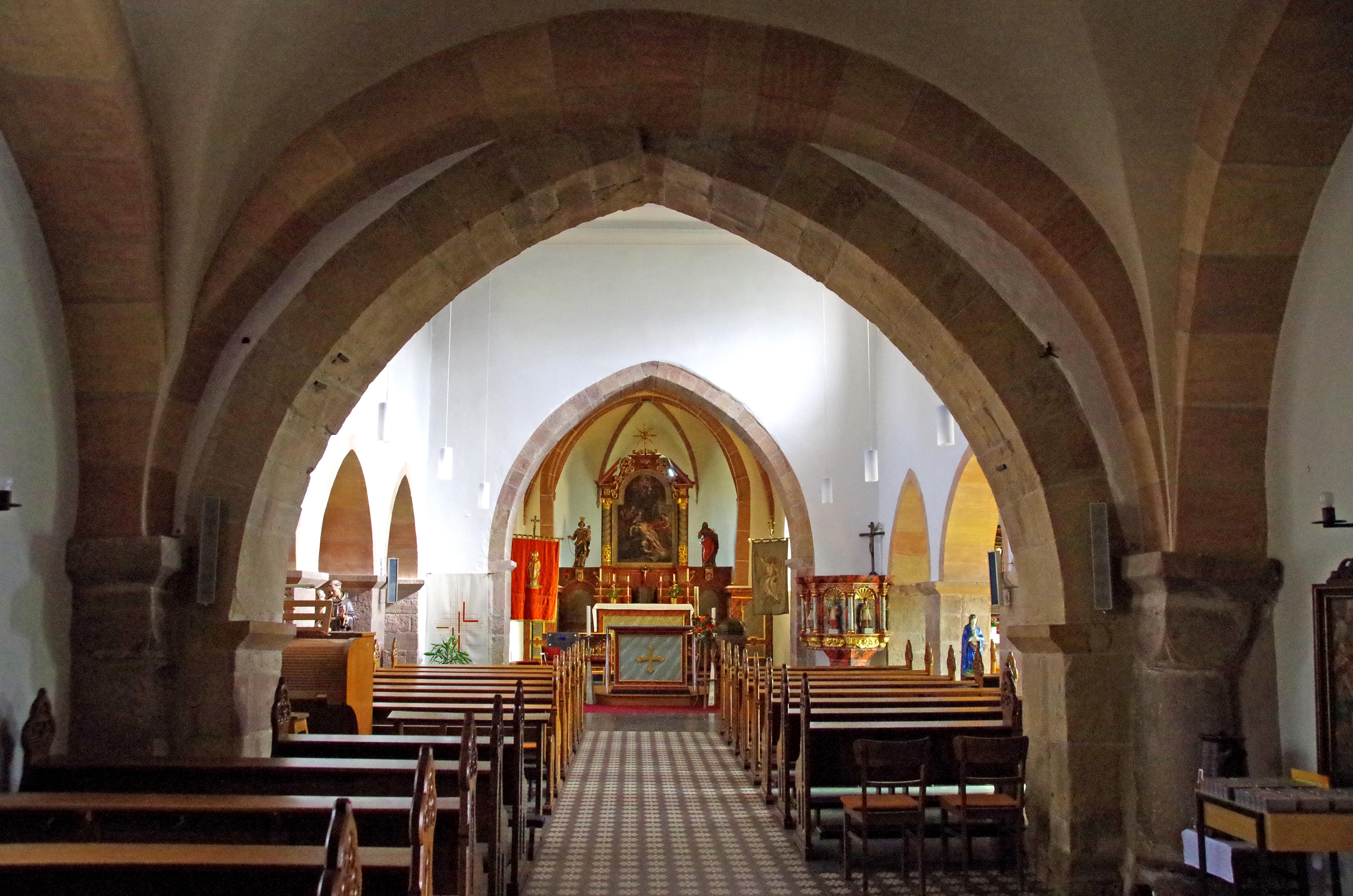 St. Dionysius (Vlatten), Mittelschiff vom Westchor aus